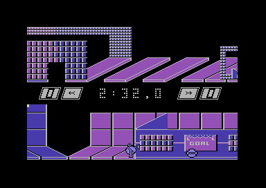 Screenshot zum Commodore 64 Spiel Limes & Napoleon aus dem Jahr 1989